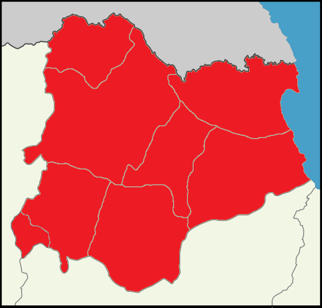 Kırklareli'de 2014 Türkiye cumhurbaşkanlığı seçimi sonuçları